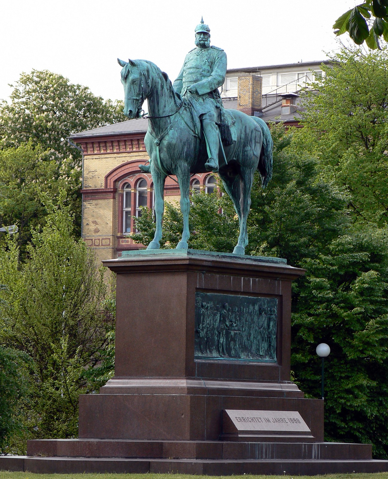 Das Kaiser-Wilhelm-I.-Reiterstandbild im Schlossgarten von Kiel. Enthüllung am 24. November 1896 nach einem Entwurf von Adolf Brütt. Die Inschrift auf der Westseite des Sockels lautet: "WILHELM DEM ERSTEN ER BEFREITE SCHLESWIG-HOLSTEIN" Die Inschrift auf der Ostseite des Sockels (Bild) lautet: "ERRICHTET IM JAHRE 1896"